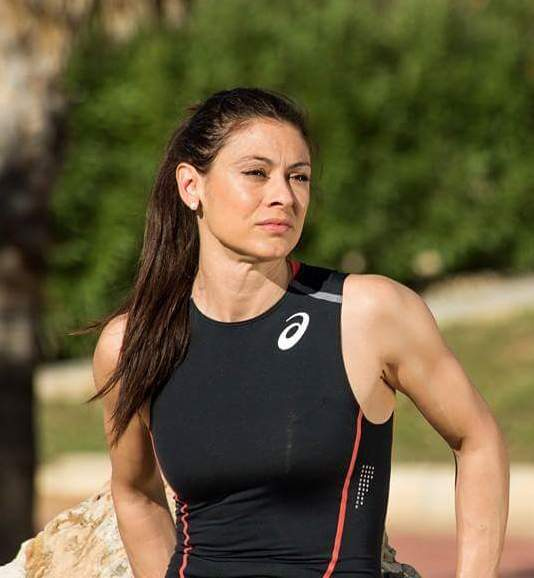 Concha Montaner, atleta valenciana de salt de llargada